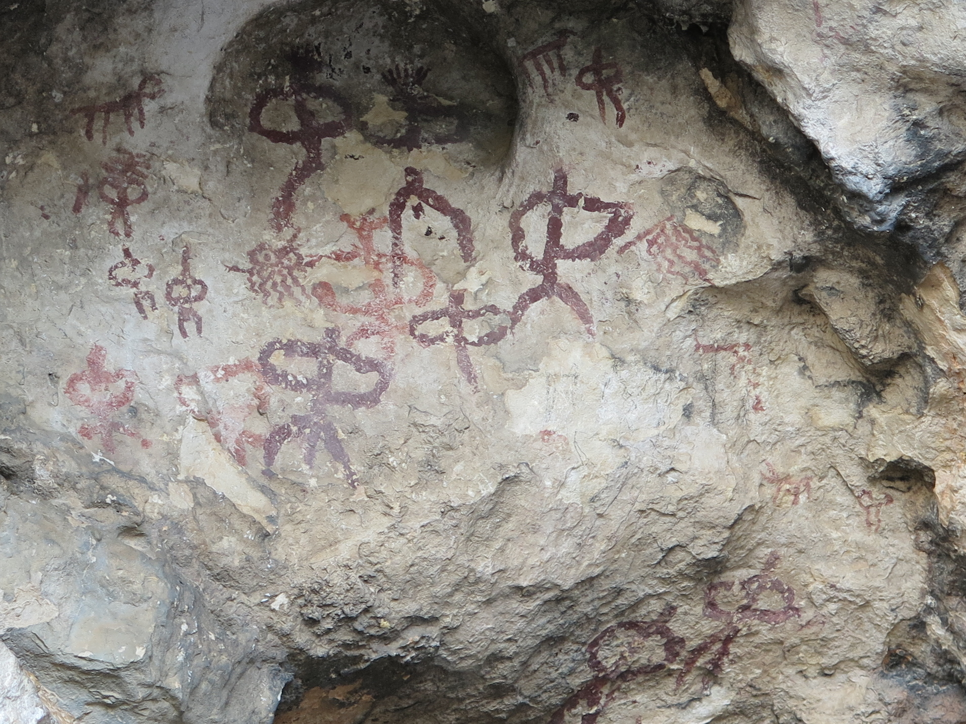 Pinturas rupestres de la Cueva de la Graja, Jimena, provincia de Jaén.